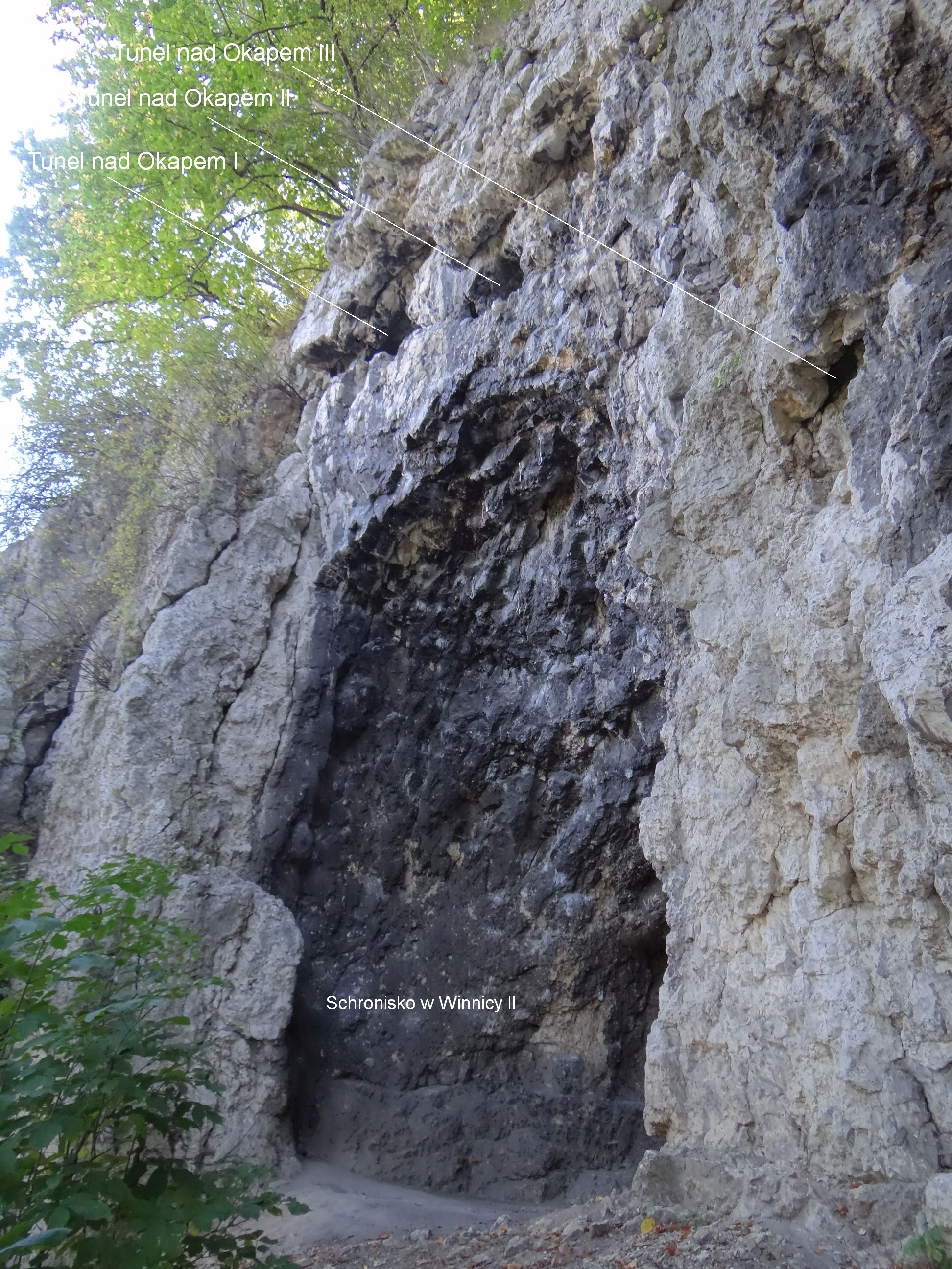 Schroniska w skale Skurwysyn na wzgórzu Winnica w Tyńcu w Krakowie